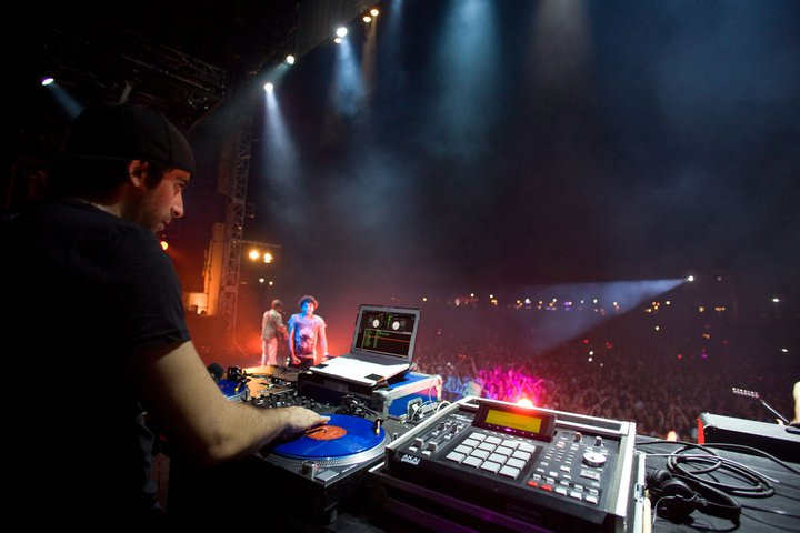 Live stge photo